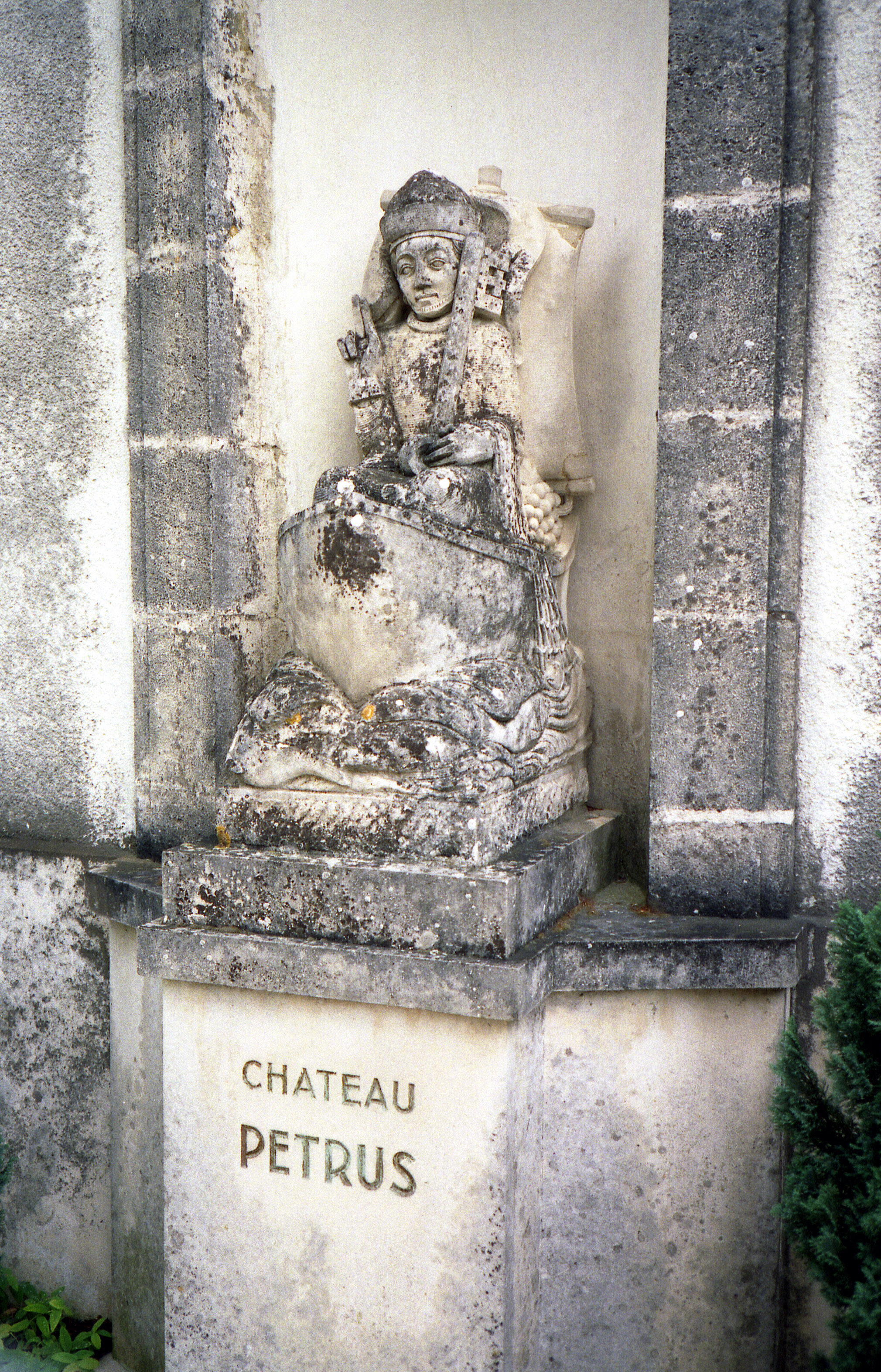 Château Petrus - Bordeaux - Pomerol